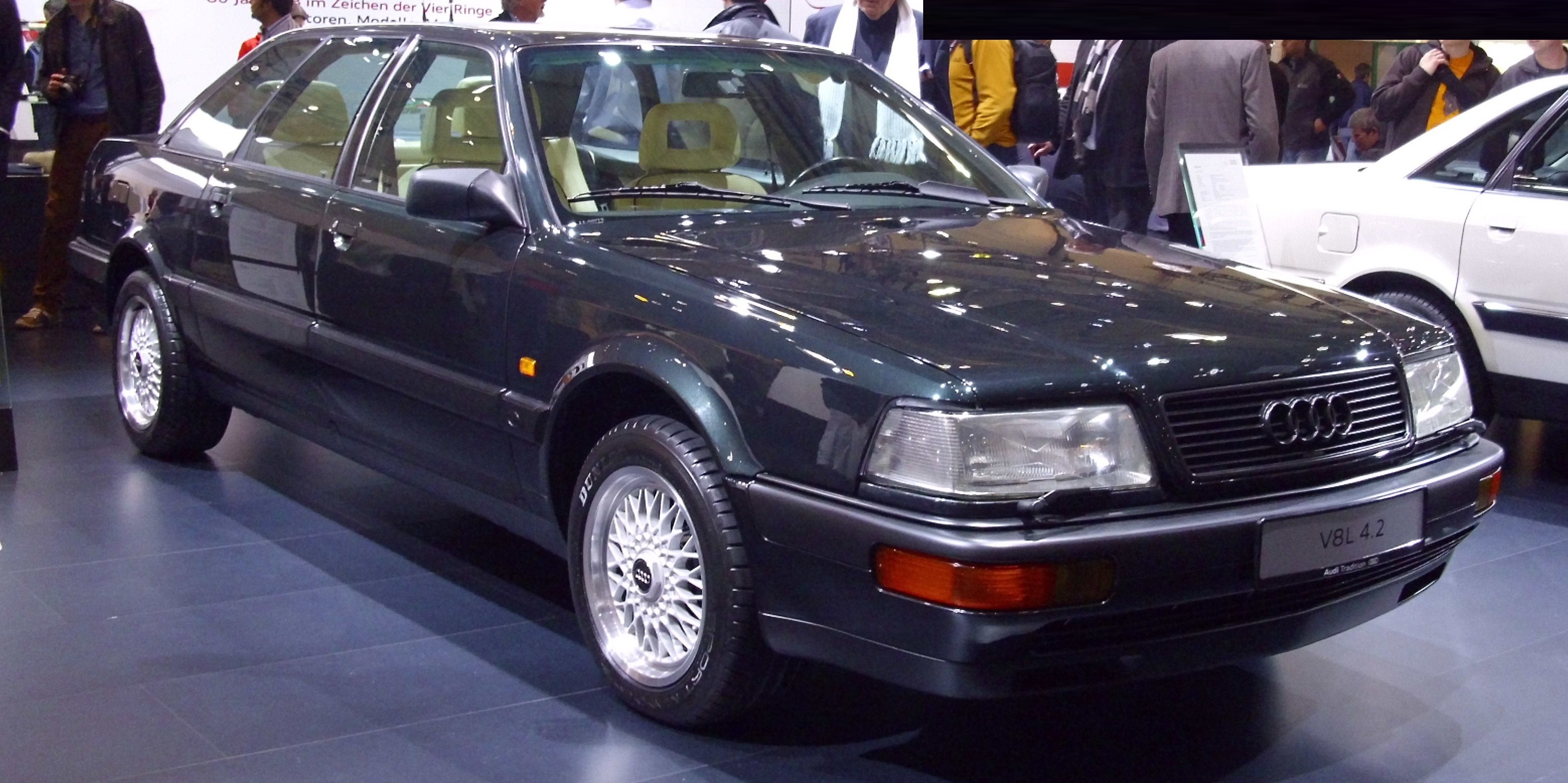 Audi V8 L 1990